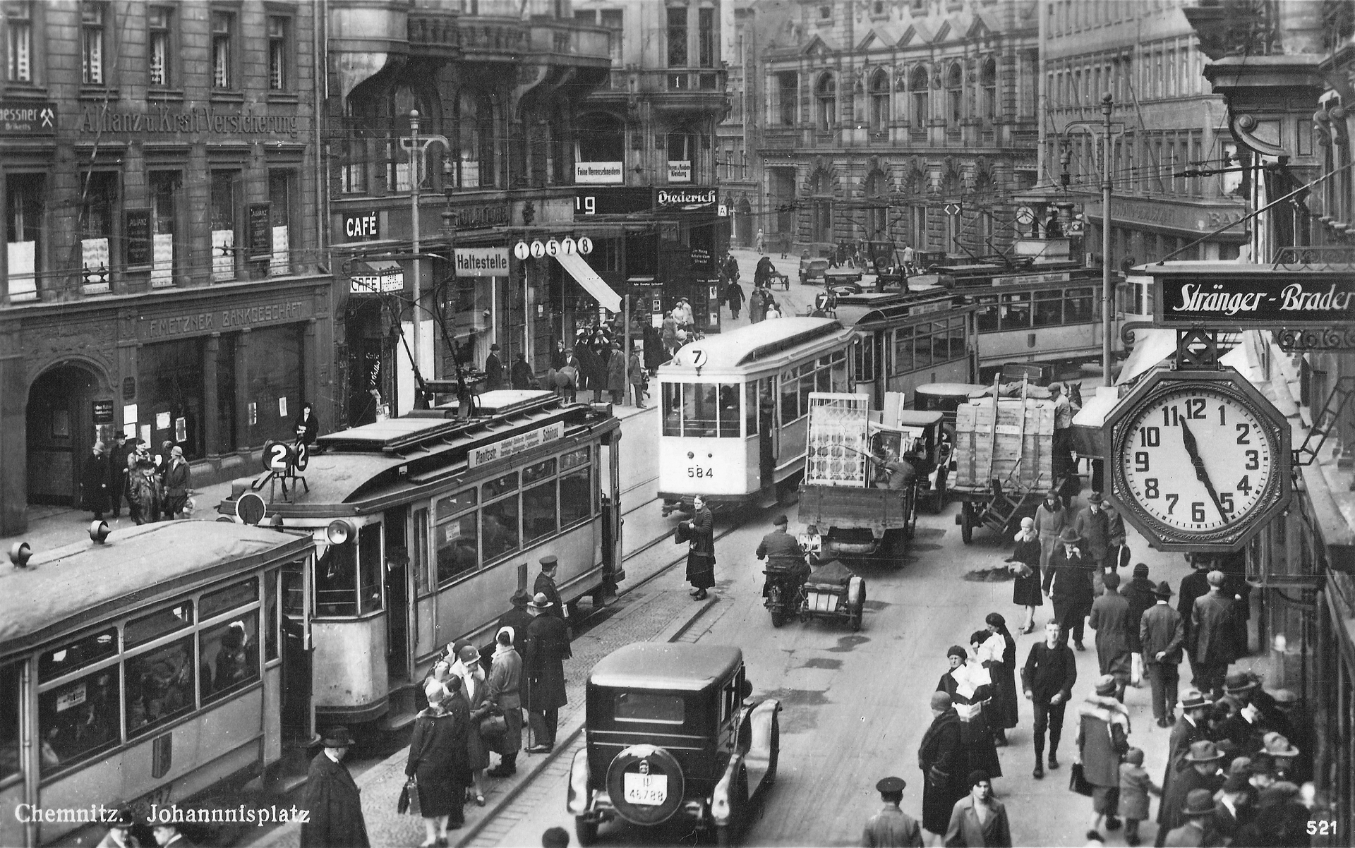 Der Johannisplatz in der Chemnitzer Innenstadt um 1930